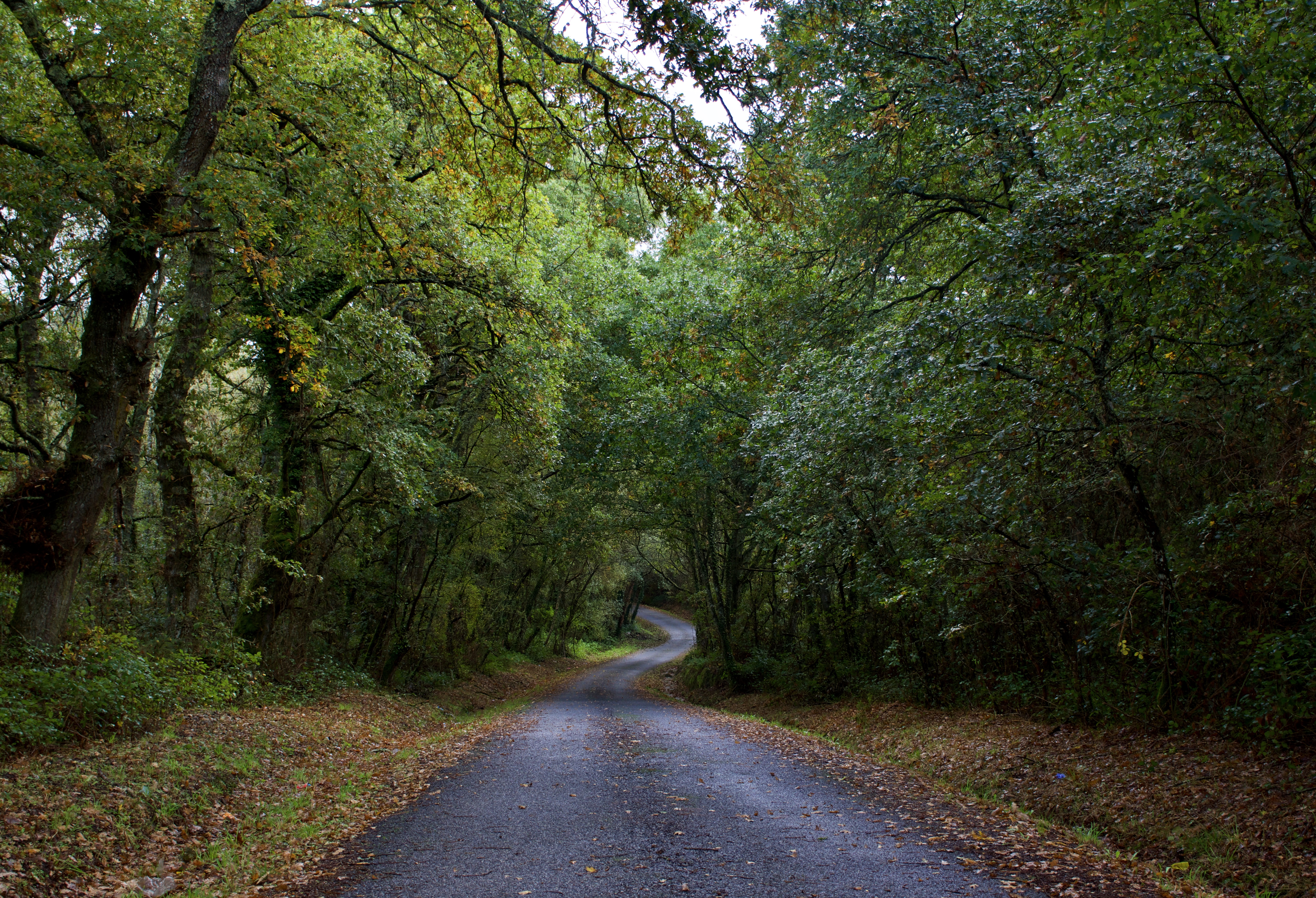 Estrada convencional de Outeiro de Rei por onde se pode acceder a unha zona do Regato do Cepelo